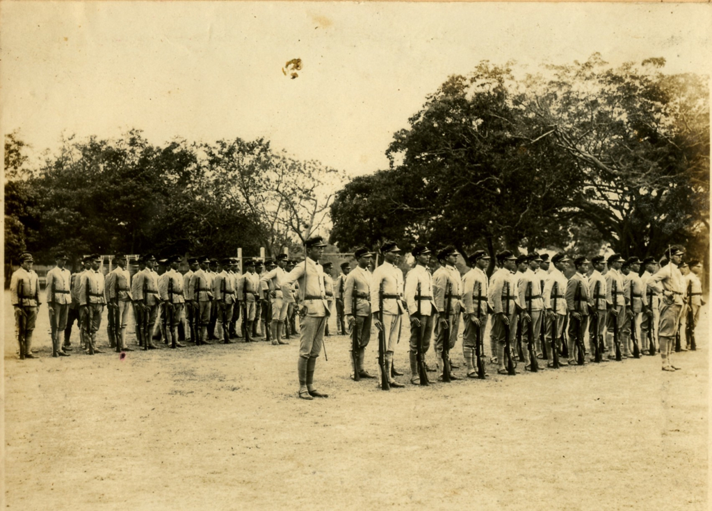 高雄中學二二八事件學生隊